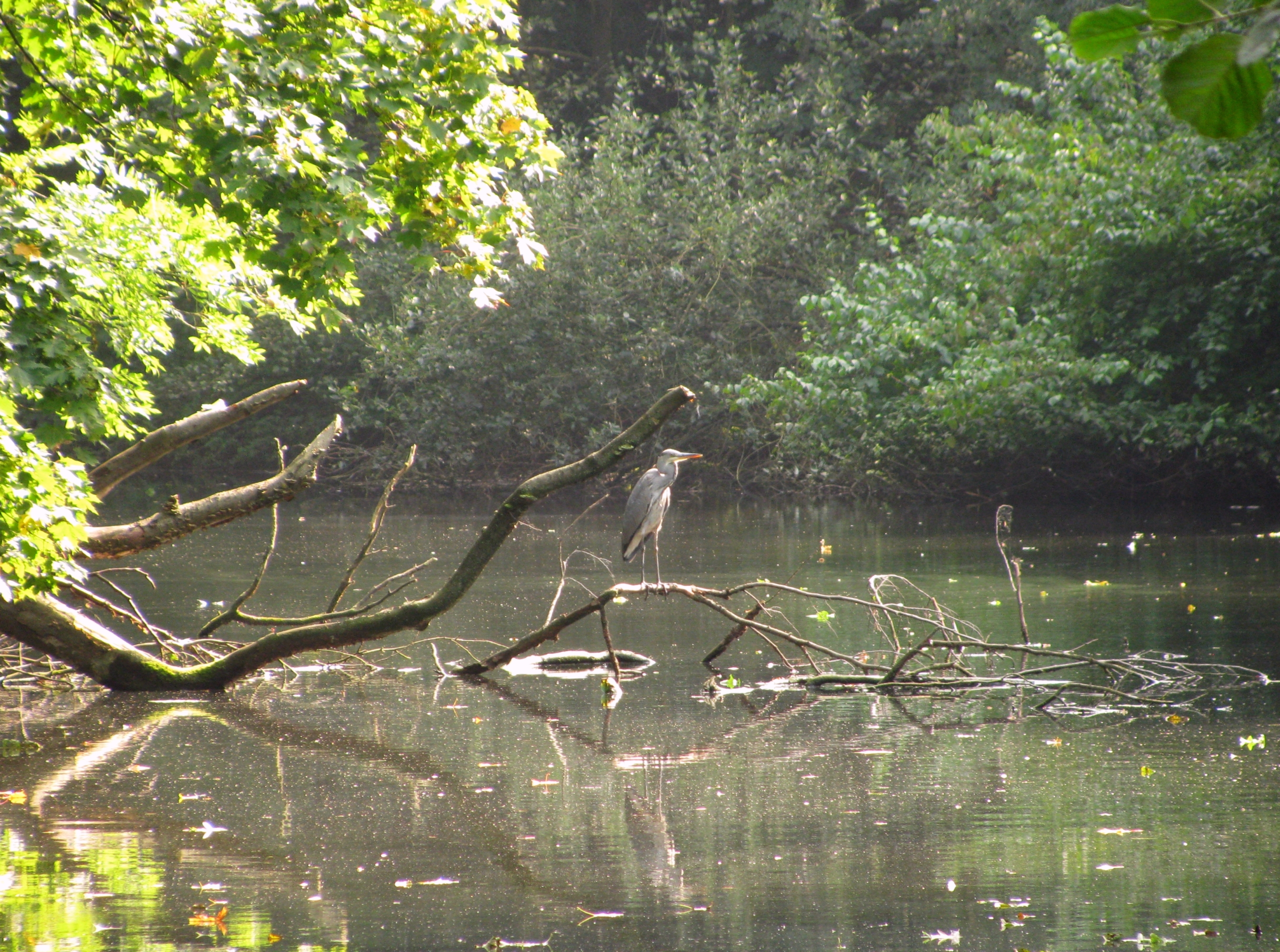 Graureiher im Rottmannsteich in Bochum